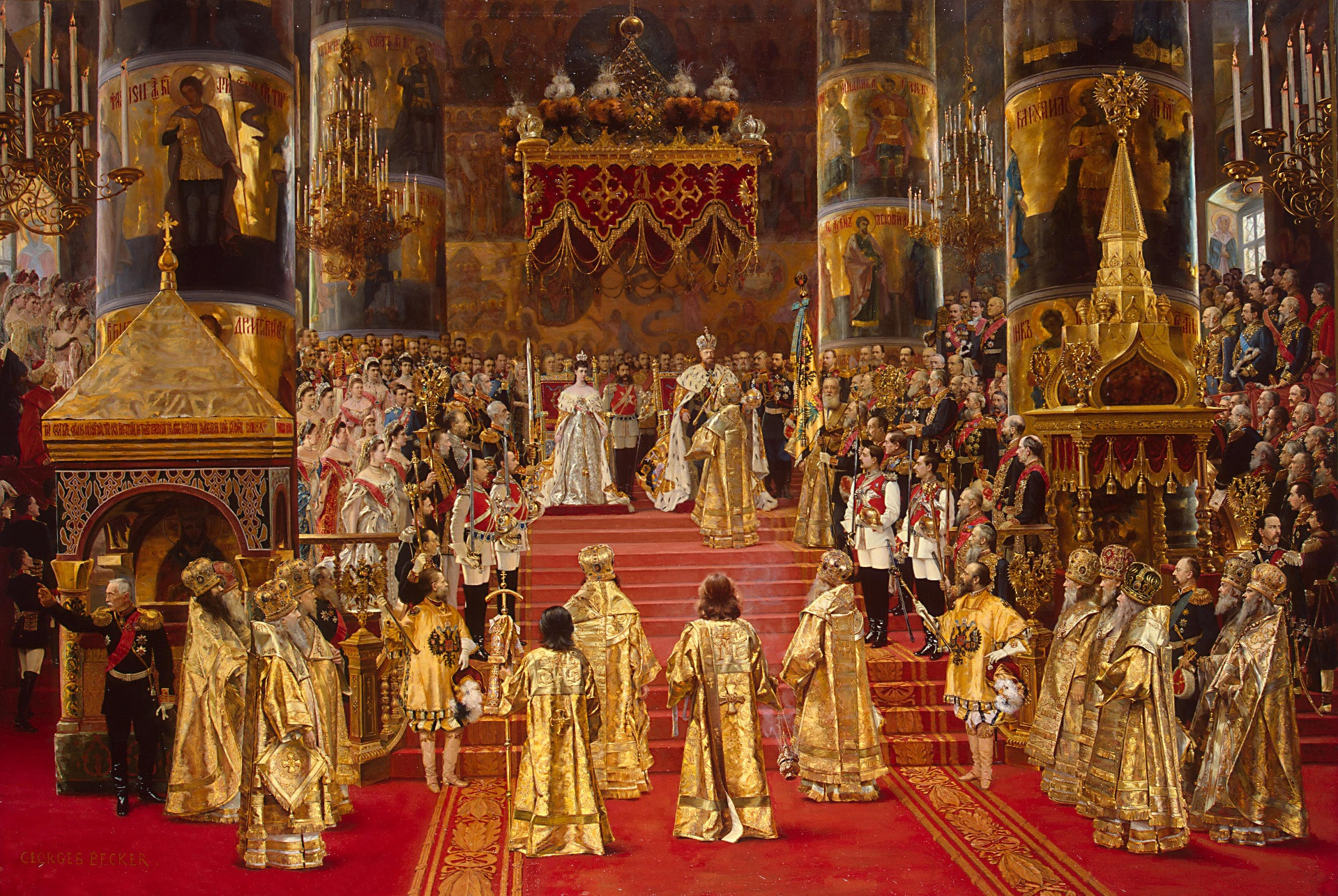 Ж. Беккер. "Коронация императора Александра III и императрицы Марии Федоровны 25 мая 1883 года" (1888), Эрмитаж. 108х156 см ЭРЖ-1637 Coronation of Maria Fyodorovna and Alexander III